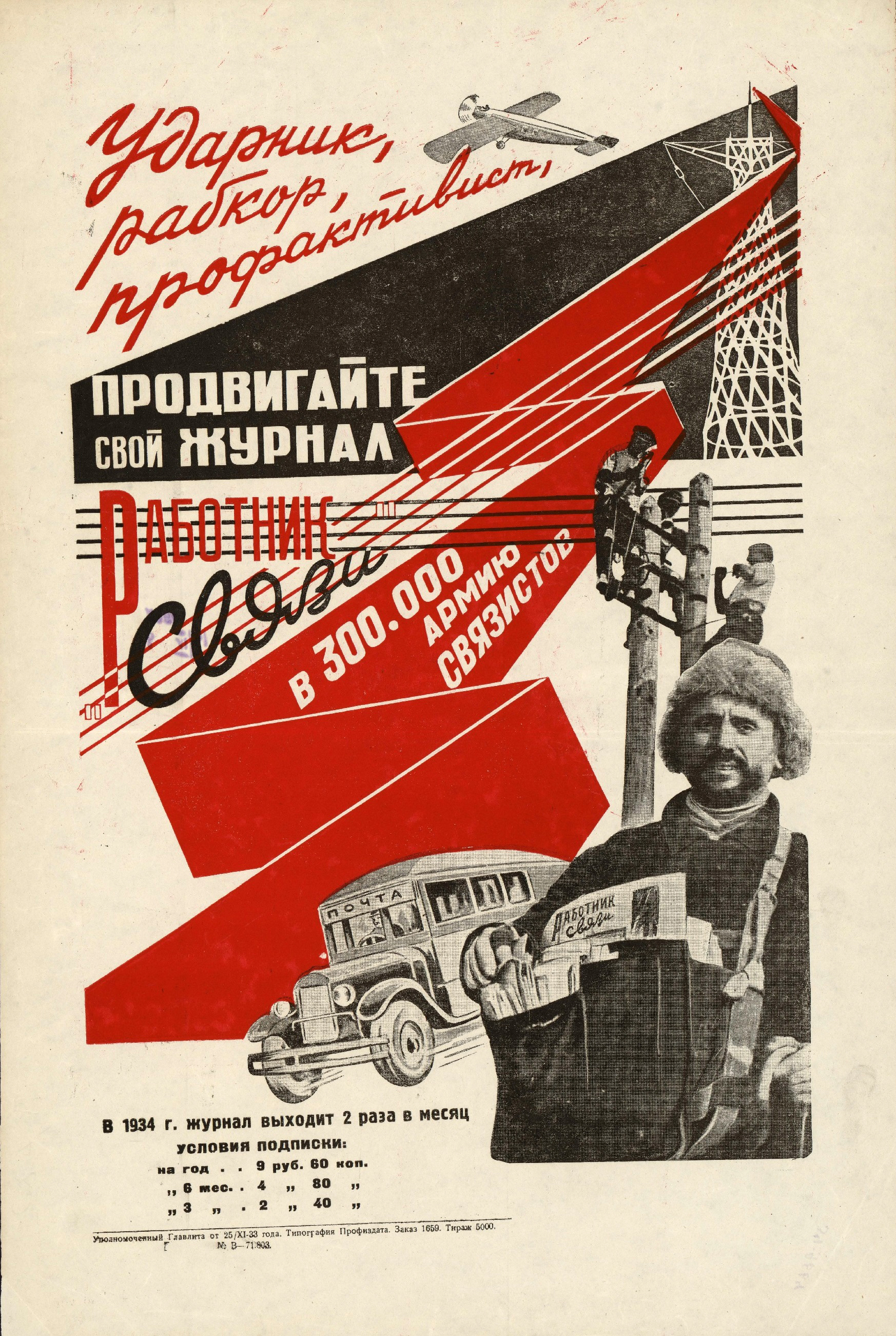 Ударник, рабкор, профактивист, продвигайте свой журнал «Работник связи» : [плакат]. — [Москва] : [б. и.], 1933 (Москва : Типография Профиздата). — Автотипия, офсет, 1 лист, 46,5 × 31 см. — 5000 экз.